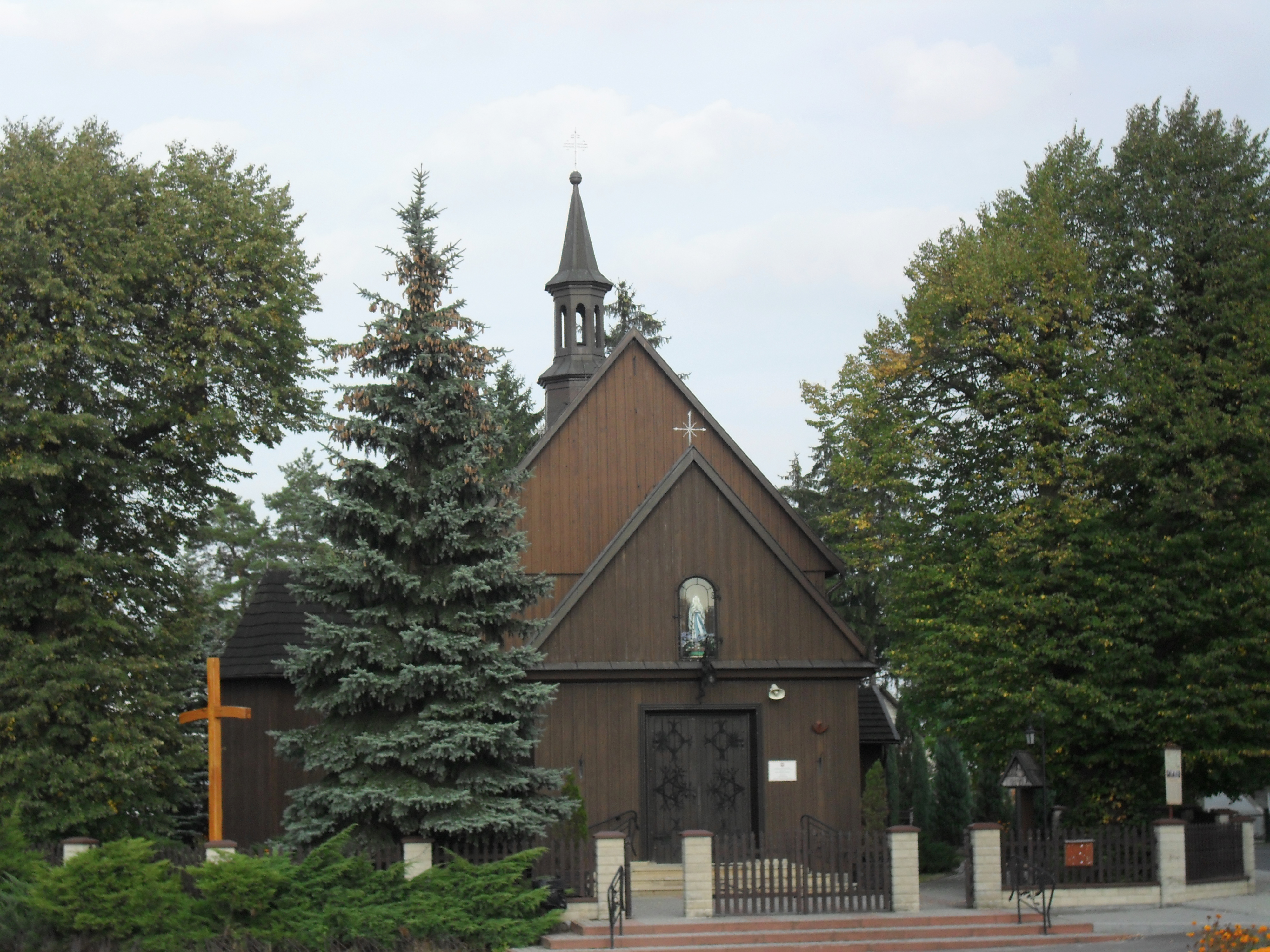 Żelichów - rzymskokatolicki kościół parafialny p.w. Najświętszego Serca Jezusa (dec.: św. Zygmunta), drewn.-mur. 1642 (na obecne miejsce przeniesiony z Pleśnej w 1938r.)